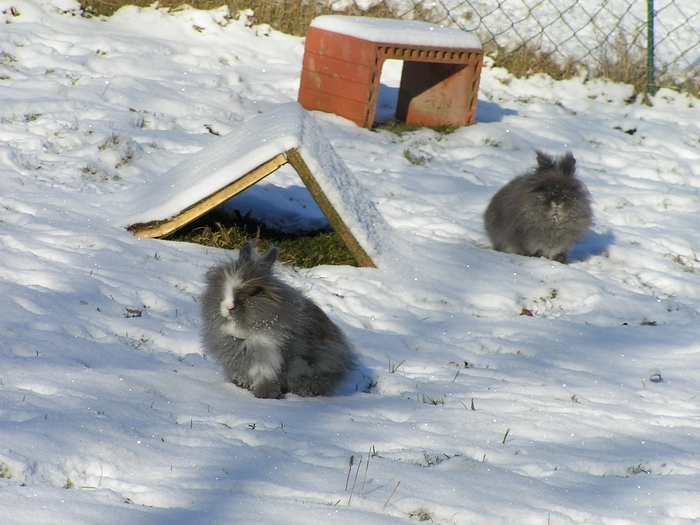 Kaninchen im Winter